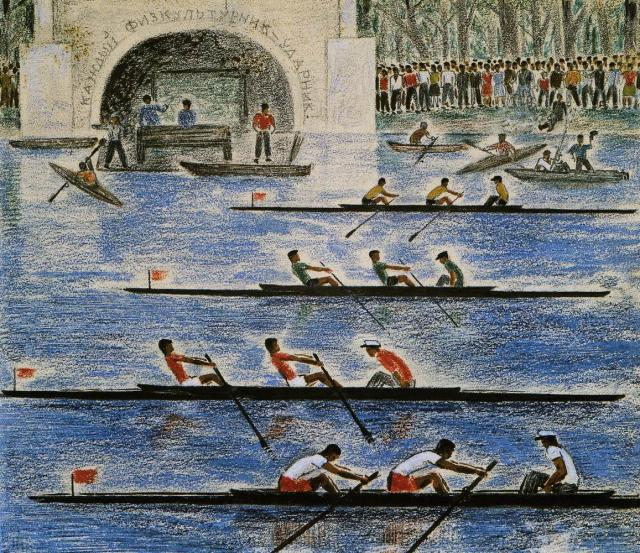 Новиков П.В. Макет книги «Стадион» Лист 7 1929 Бумага, цветной карандаш, графитный карандаш, акварель, белила. 19,2 х 22,3 Государственный Русский музей